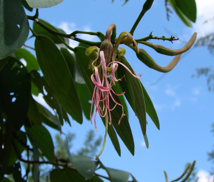 Bauhinia ungulata - FABACEAE Parque Olhos D'Água - Brasília - Distrito Federal - Brasil.